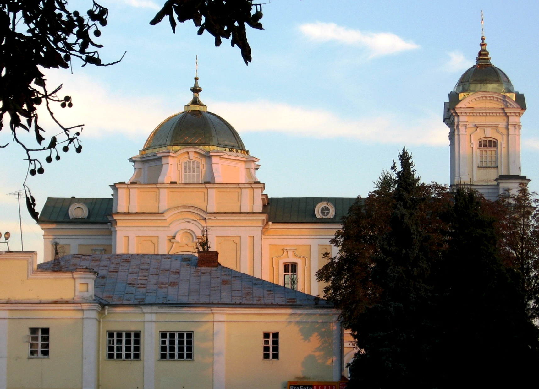 Луцьк. Свято-Троїцький собор